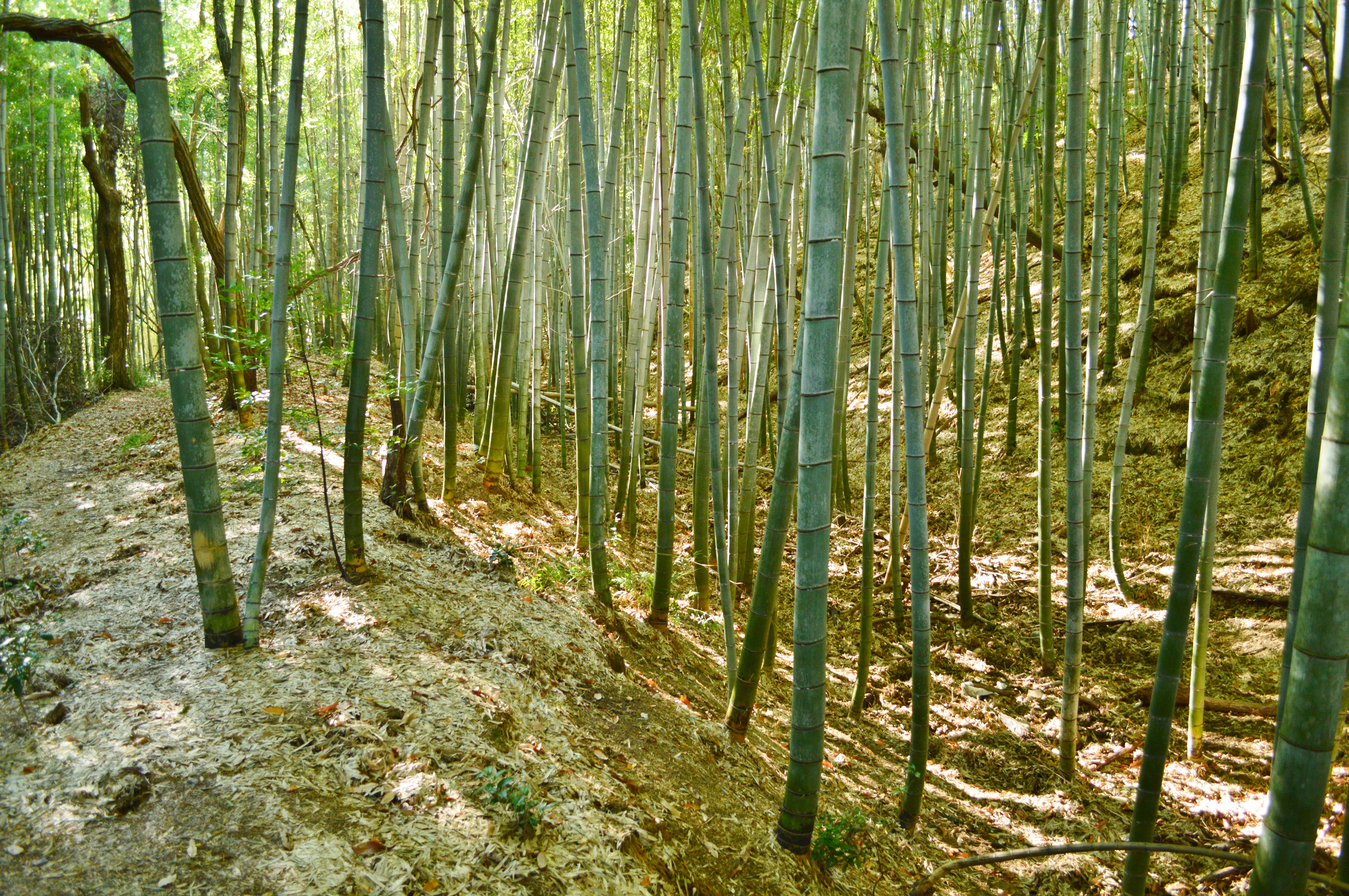 石上大塚古墳 周濠と外堤